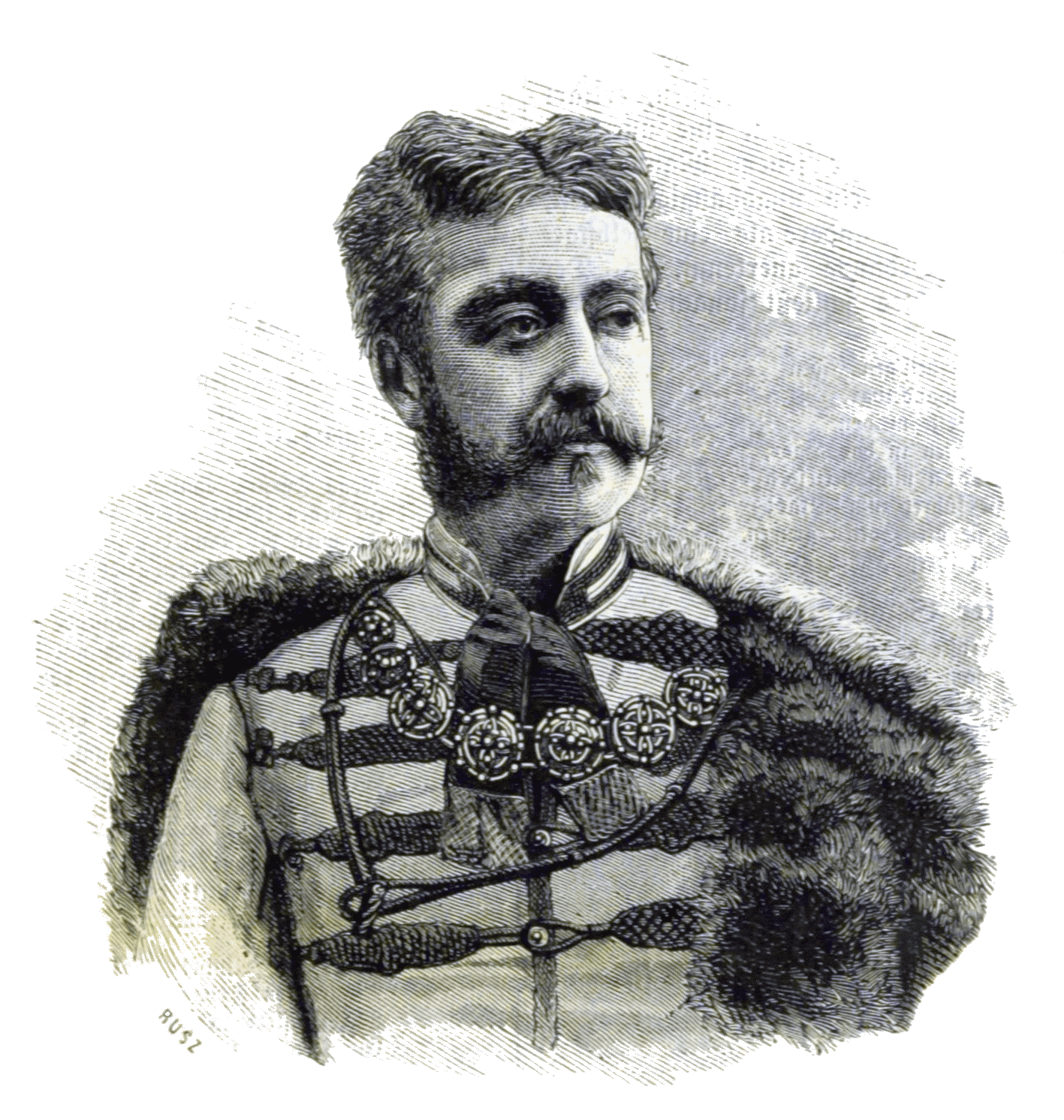 Tasziló Festetics de Tolna (1850–1933), Hungarian aristocrat